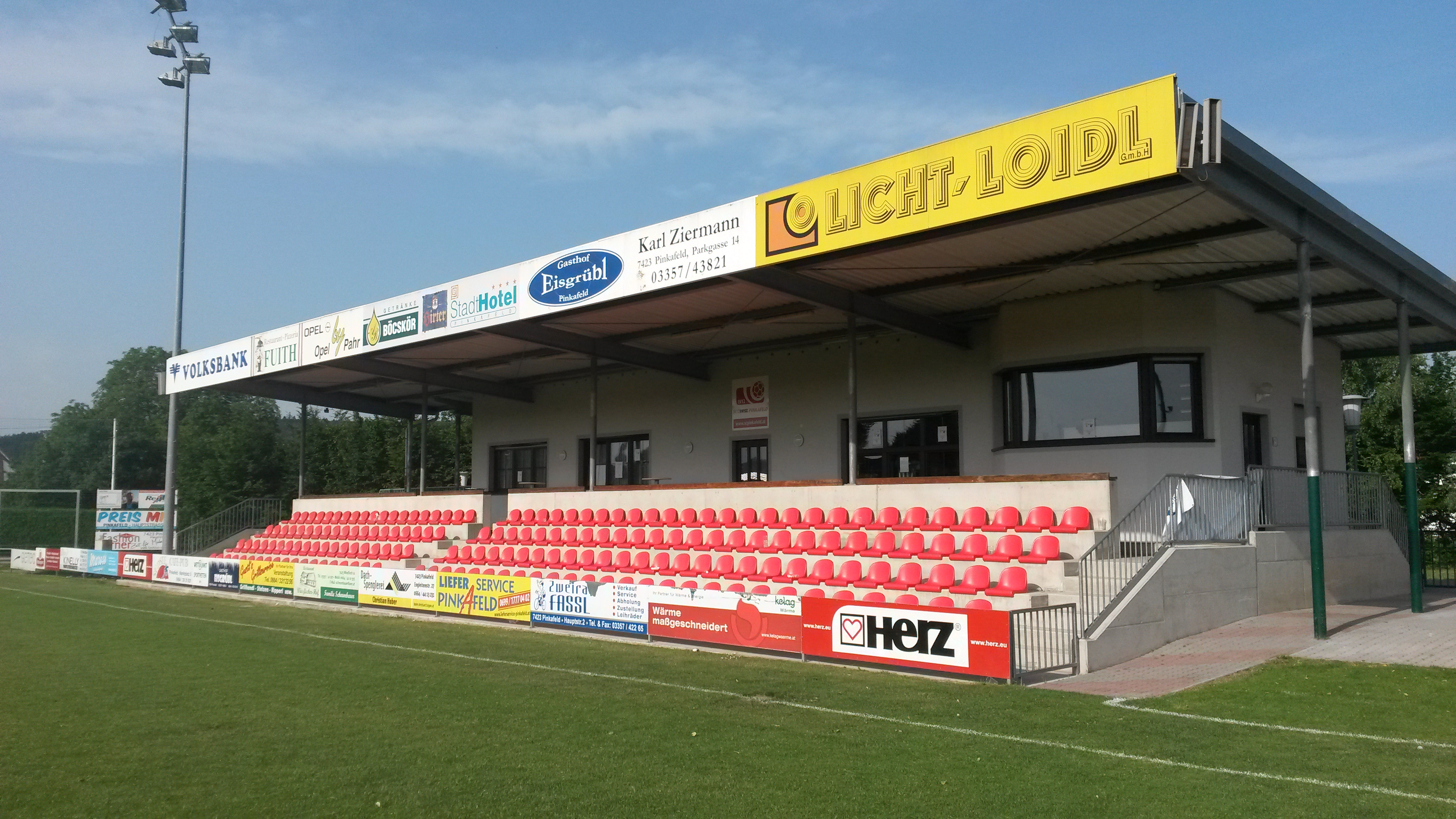 Tribüne